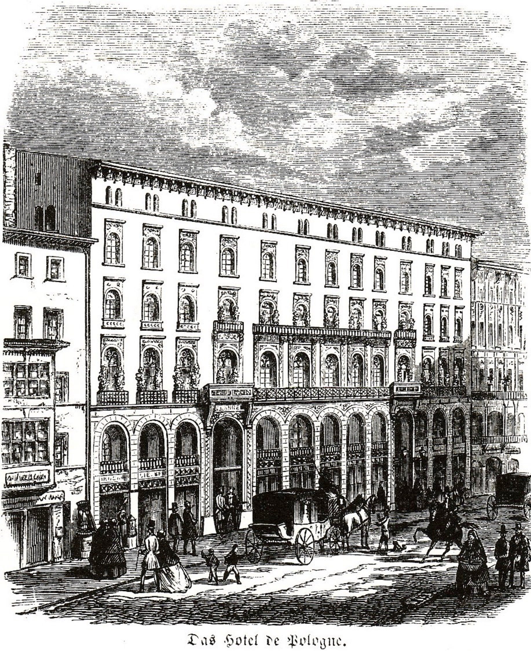 Das Hotel de Pologne in der Hainstraße Leipzig 1848.